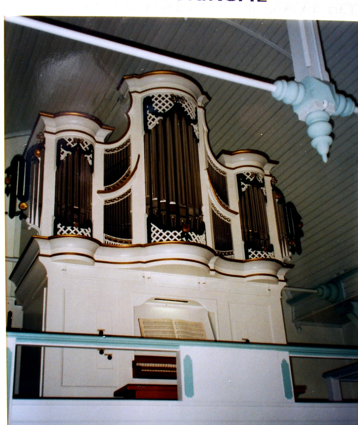 Rolfsorgel